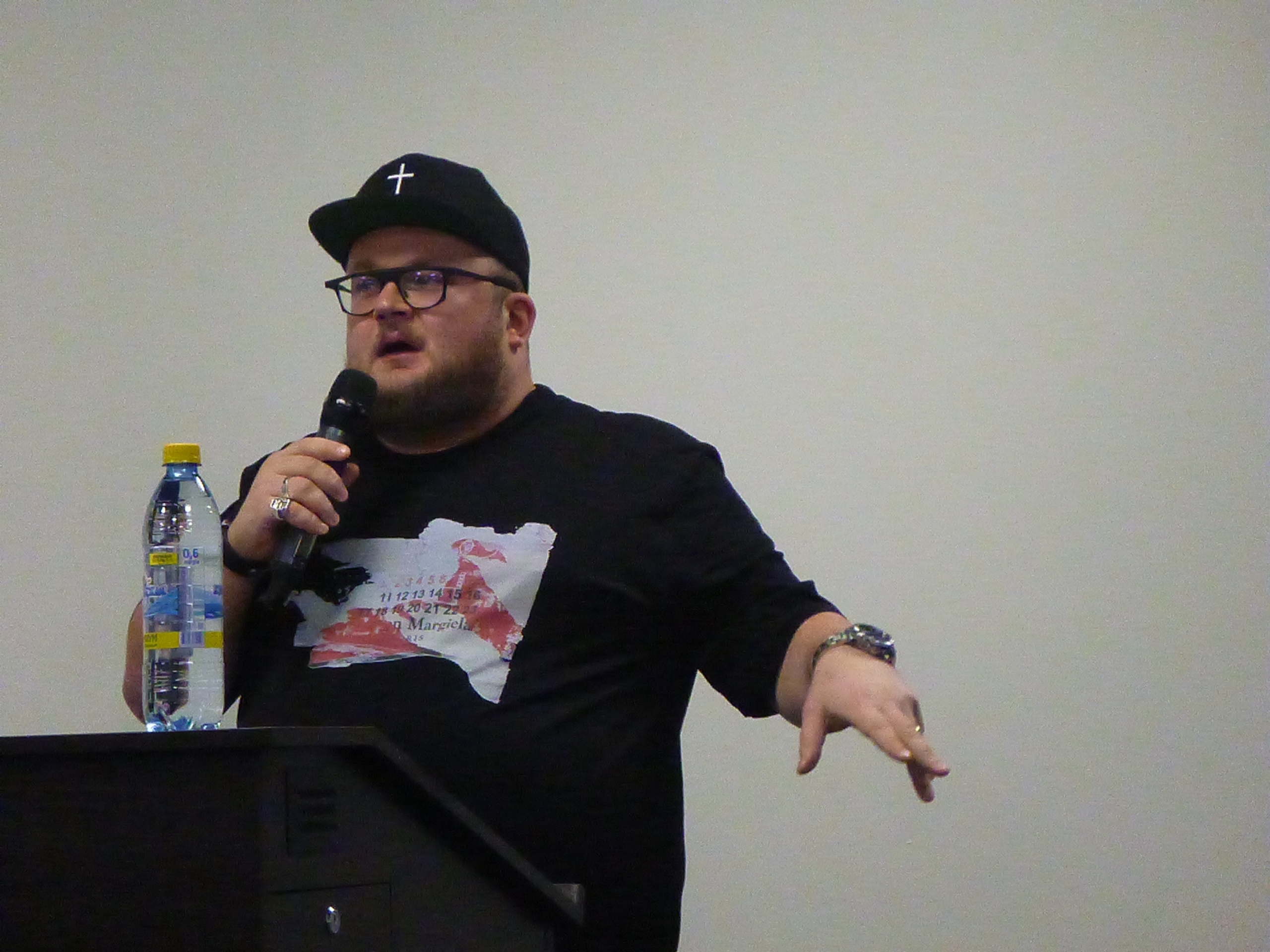 Илья Овчаренко продюсер интернет-канала Парфенон в Ельцин-центре 1 декабря 2019 года